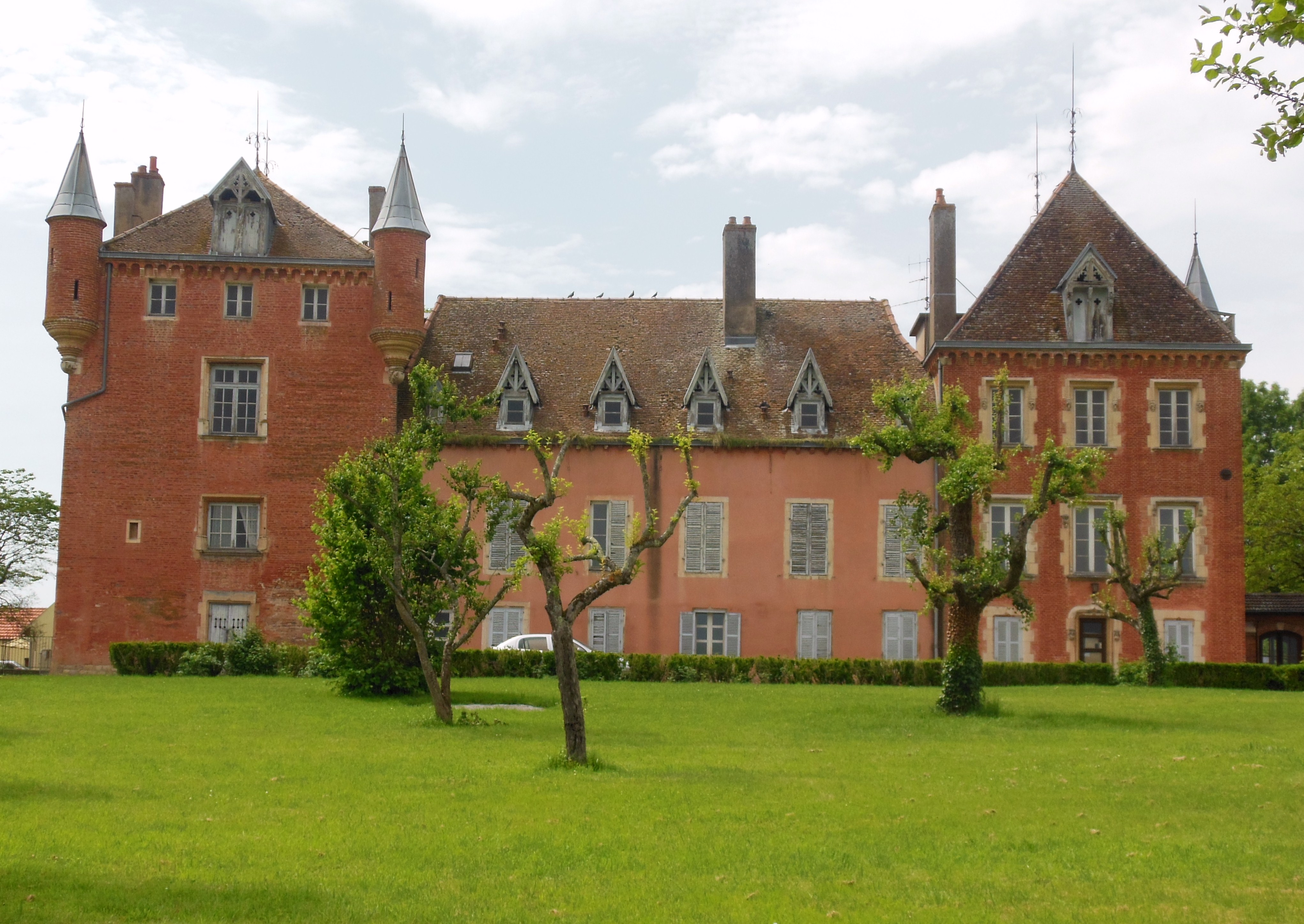 Château (probablement XVe s), dit "Vieux château", Rue du Centre, à Athée (21).